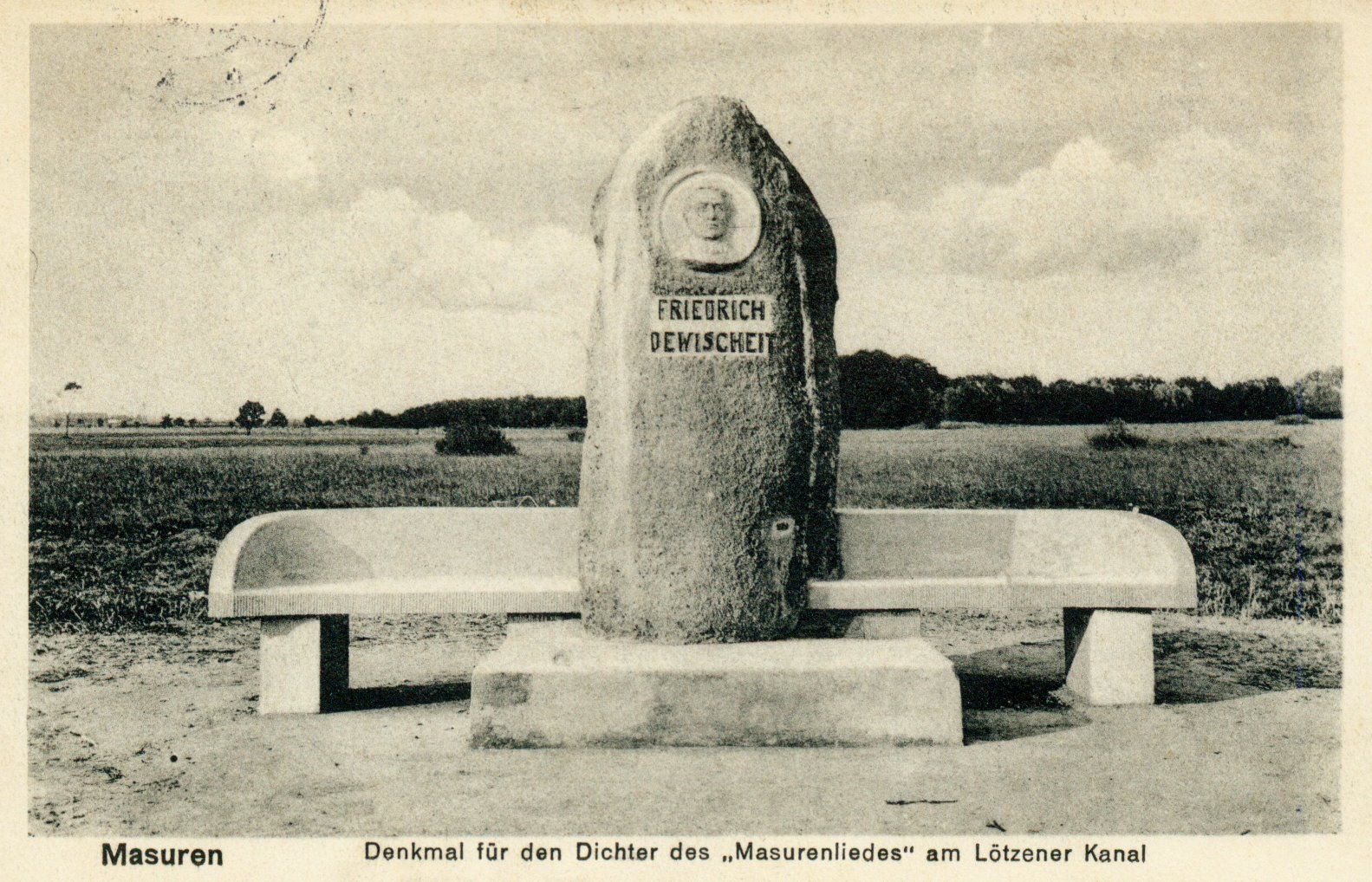 Głaz narzutowy w Giżycku